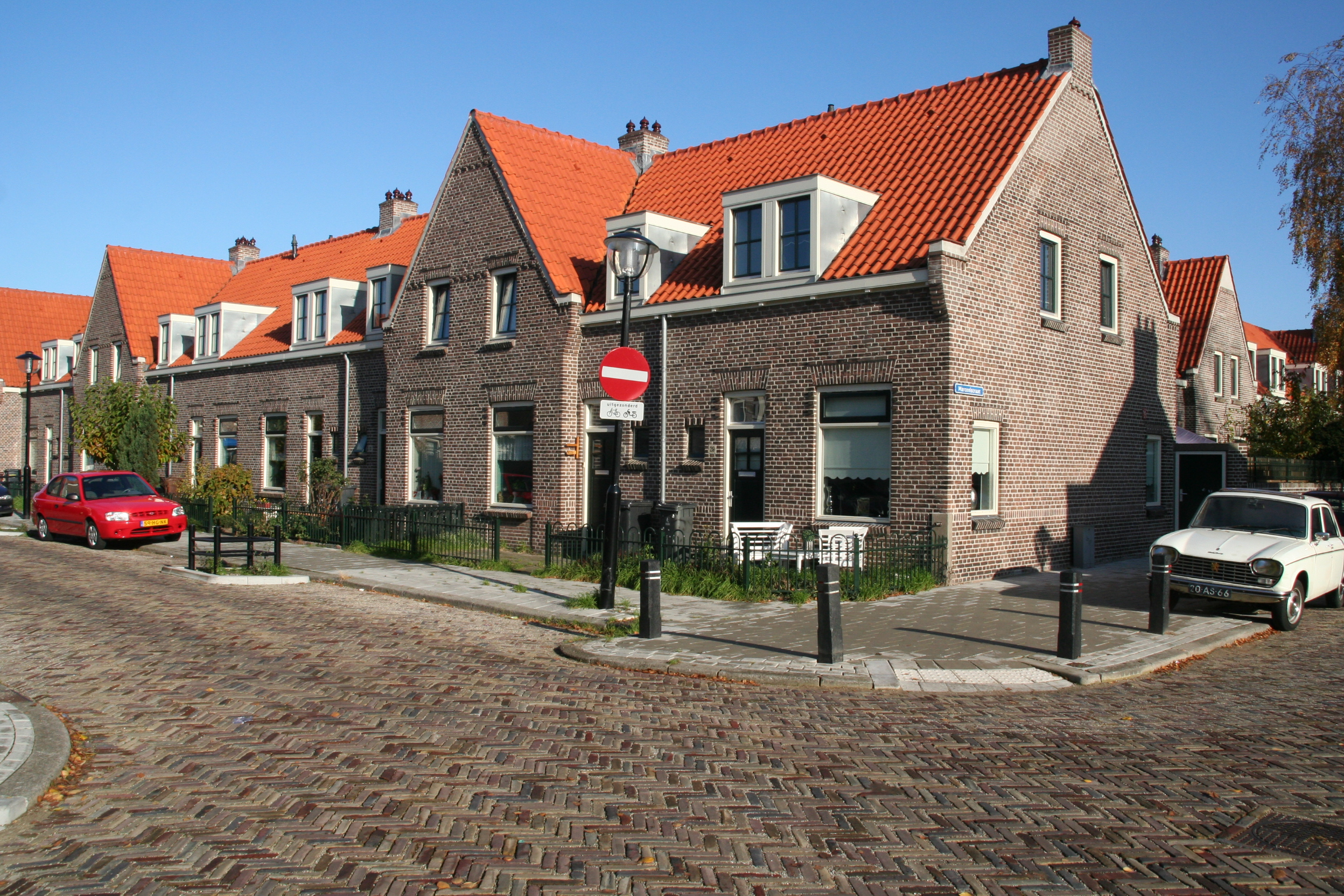 Utrecht, De Lessepsbuurt ter hoogte van de Marconistraat hoek Swammerdamstraat. Vormt deel van het Rijksbeschermd gezicht Utrecht - Zuilen-Elinkwijk.